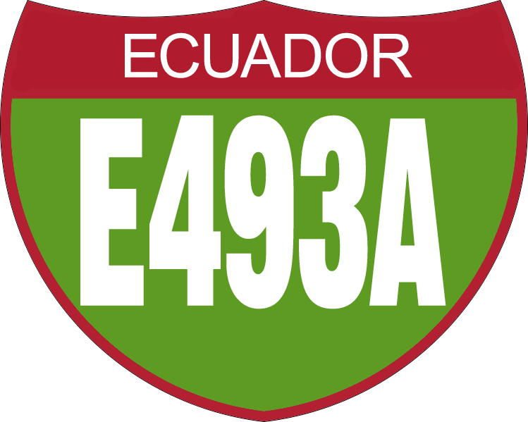 Disco de Identificación Ruta E493A